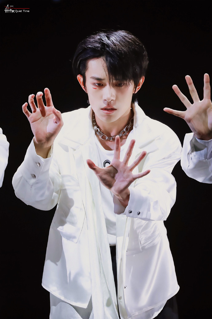 易烊千玺演唱会舞蹈